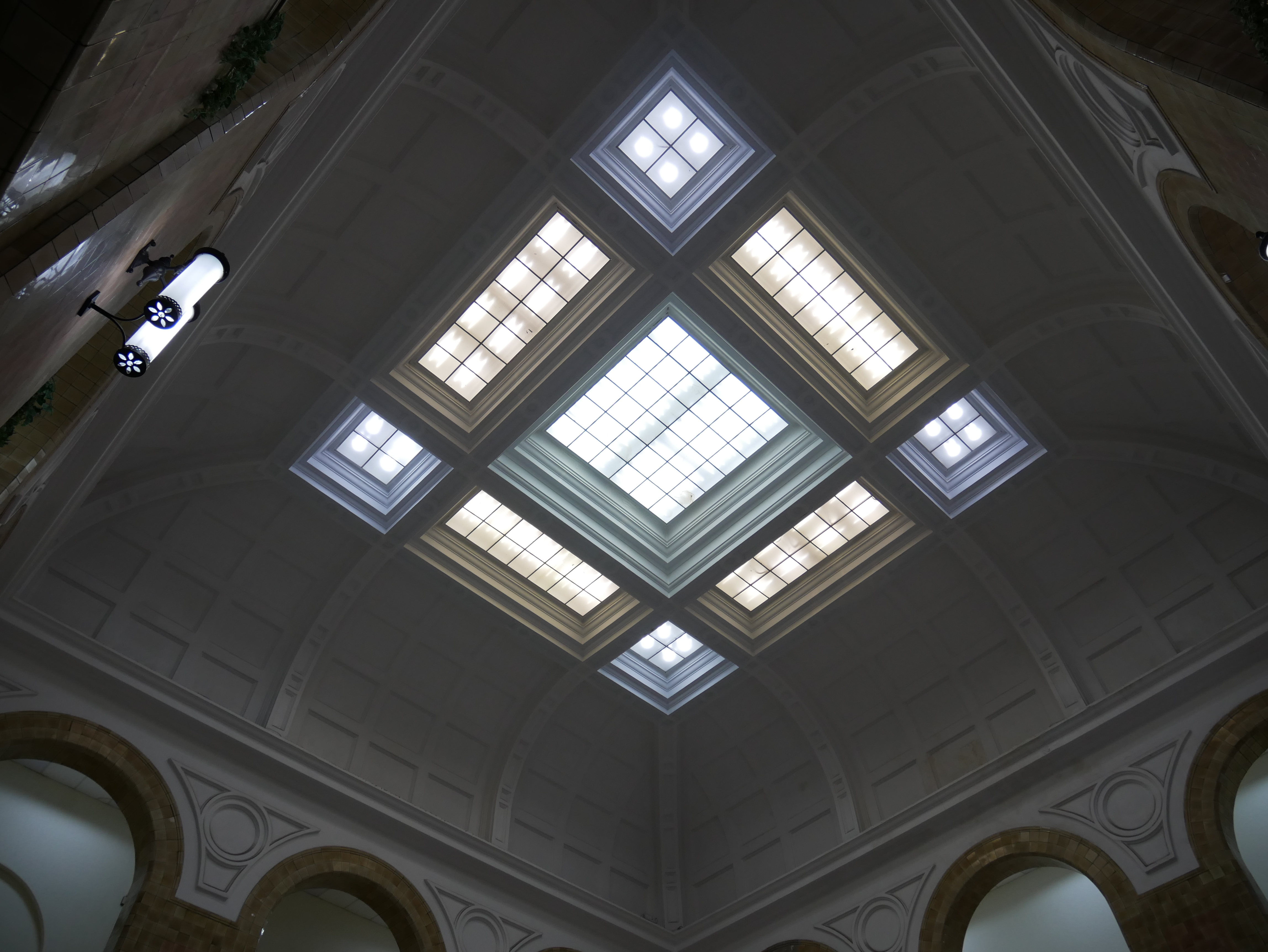 臺北帝國大學醫學部附屬病院大廳天井，臺北市中正區城內次分區黎明里